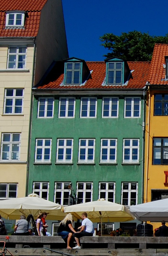 Nyhavn 15 in Copenhagen, Denmark